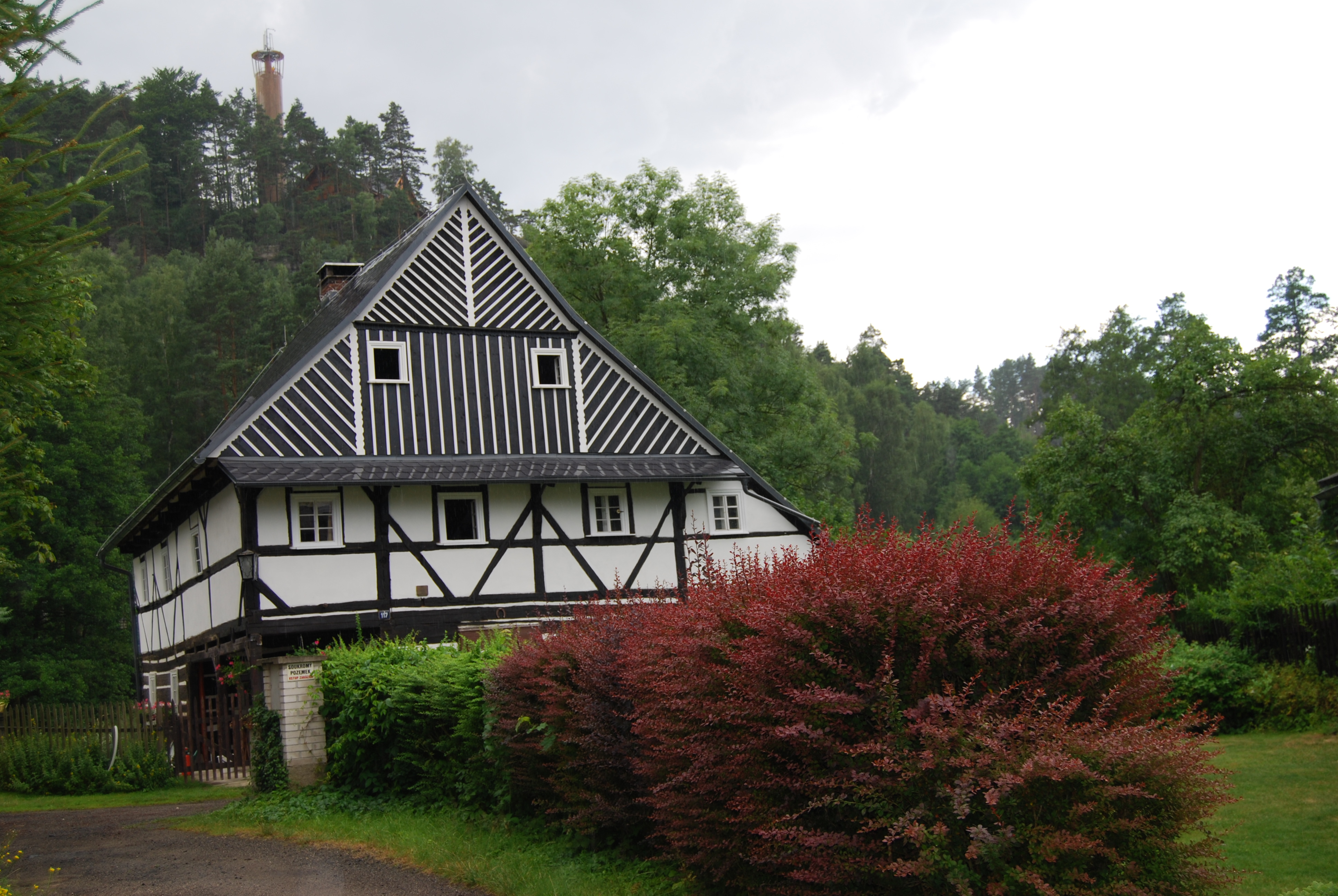 Dům v ulici Ke mlýnu. Sloup v Čechách v okrese Česká Lípa, kraj Liberecký. Česká republika. - Google Maps - Google Earth